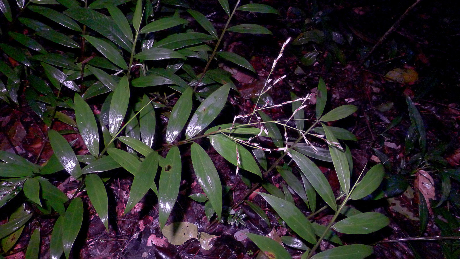 Pharus parvifolius Nash ssp. parvifolius Judz.